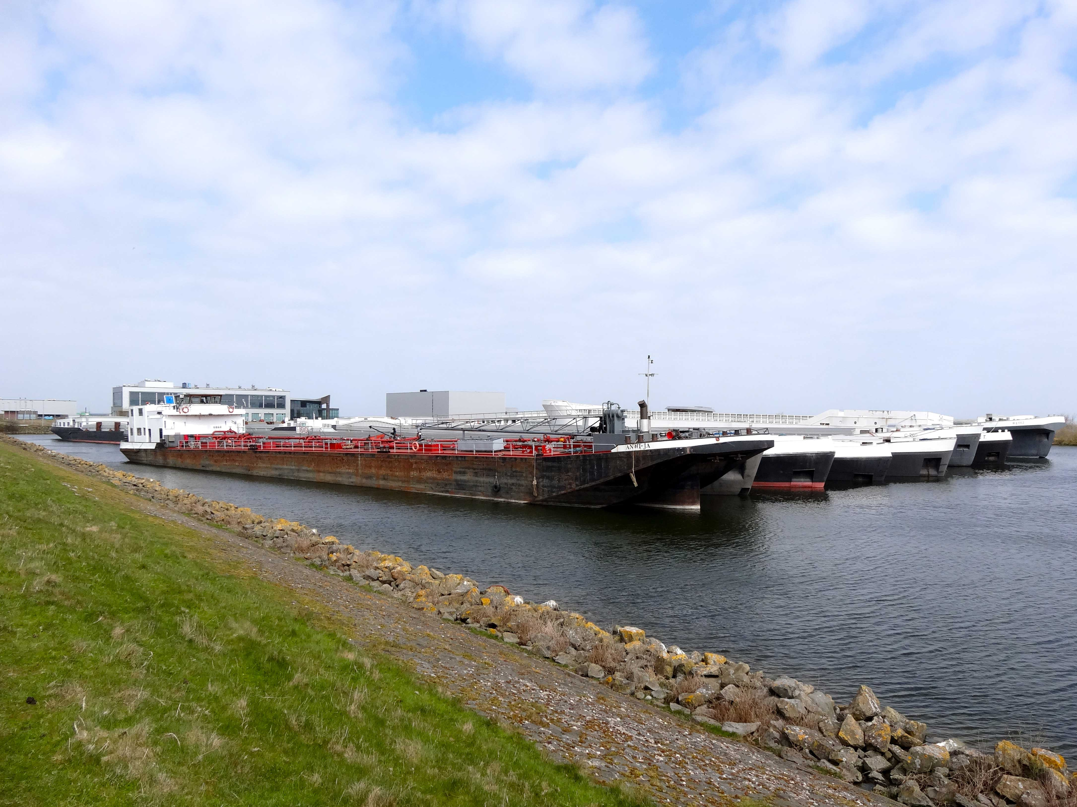 Scheepswerf bij De Oude Zeug Wieringermeer, met op de voorgrond de ANWI-JA